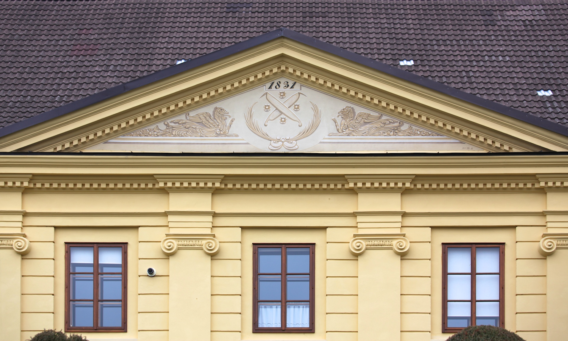 Dreiecksgiebel des Mittelrisalits, Detail. Im Zentrum des Giebelfelds das Hammerzeichen der Sensenschmiede Blumau, „Zwei Strohmesser“ im Lorbeerkranz, flankiert von Löwenfiguren. Darüber das Baujahr 1831.